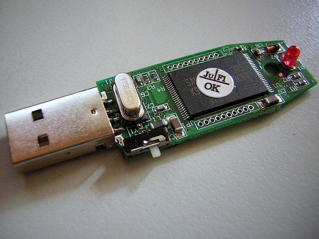 USB Stick 128MB Innenansicht [Schreibschutzschalter]